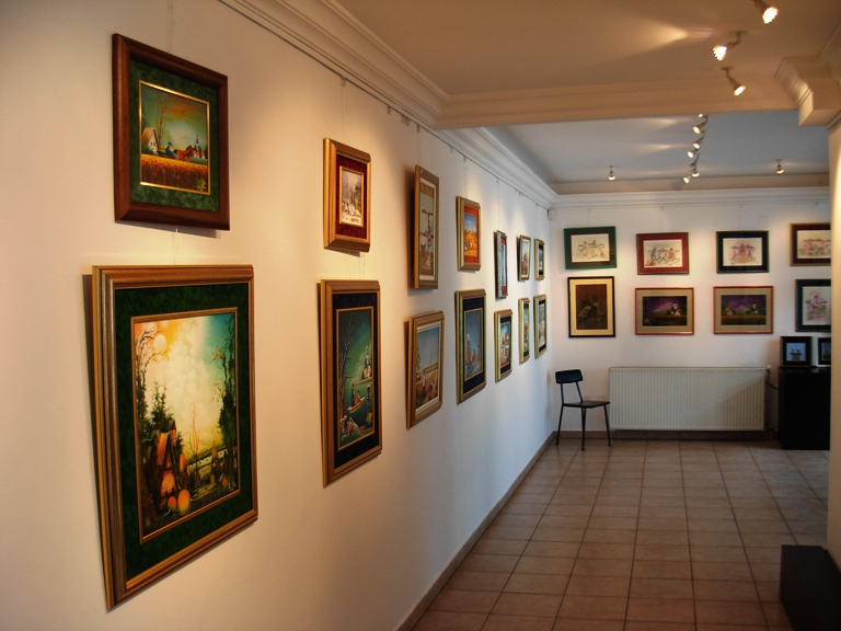 Galerija "Babka" u Kovačici